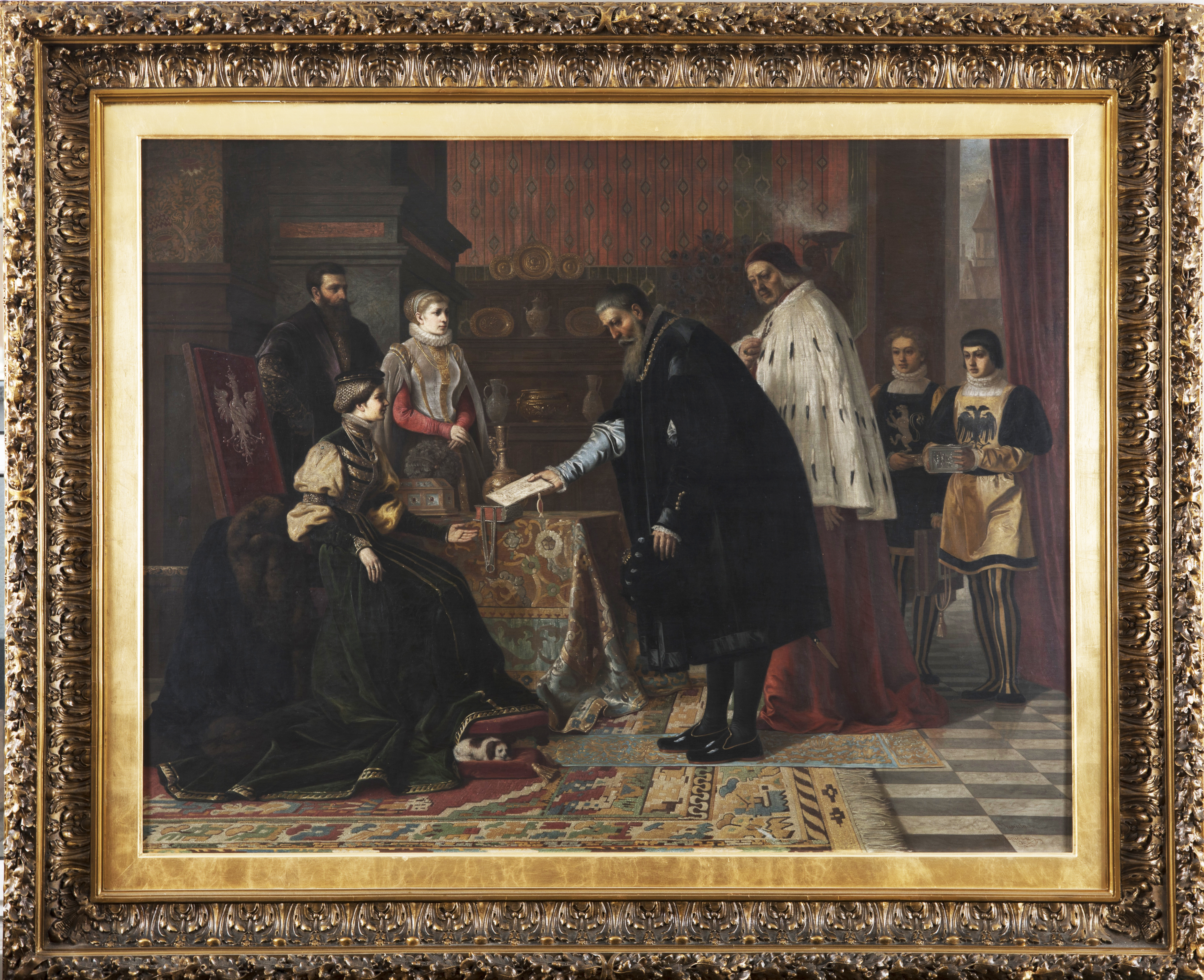 Bronisław Abramowicz, Elżbieta Habsburżanka przyjmująca poselstwo ojca Ferdynanda Habsburga, olej na płótnie 160 x 140 cm, 1883 rok